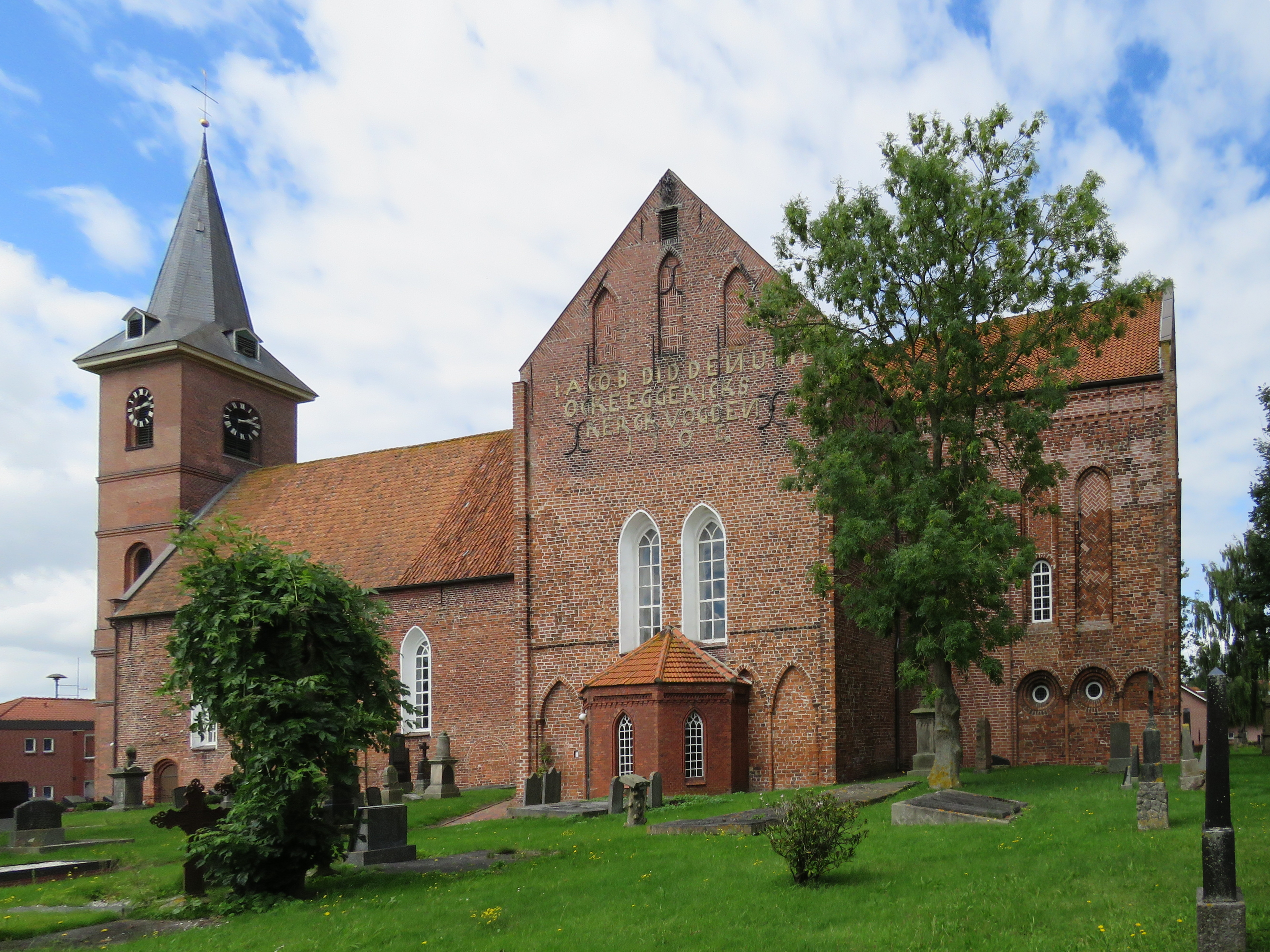 Bunde, Ostfriesland: Sankt Martinskirche zuidzijde. 13e eeuws